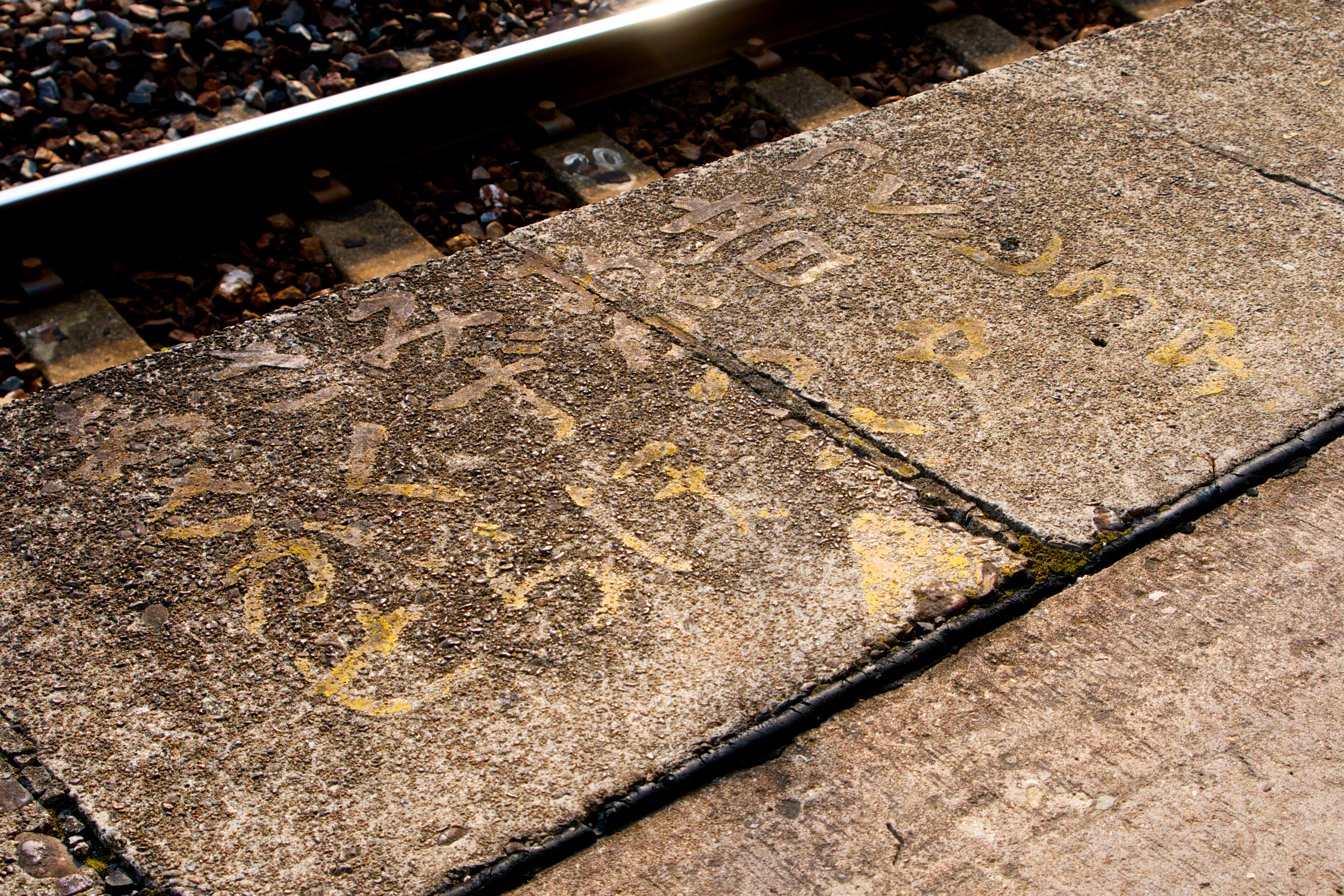 JR西日本徳山駅1番線ホームに残る乗車口表示